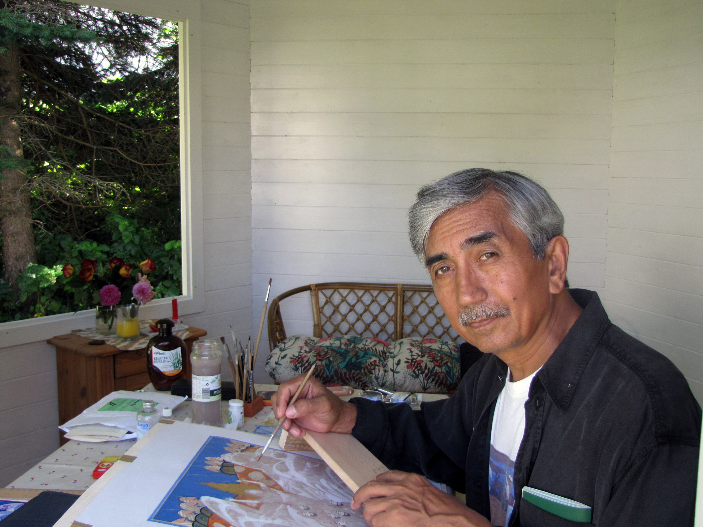 Der Künstler Niyozali Kholmatov